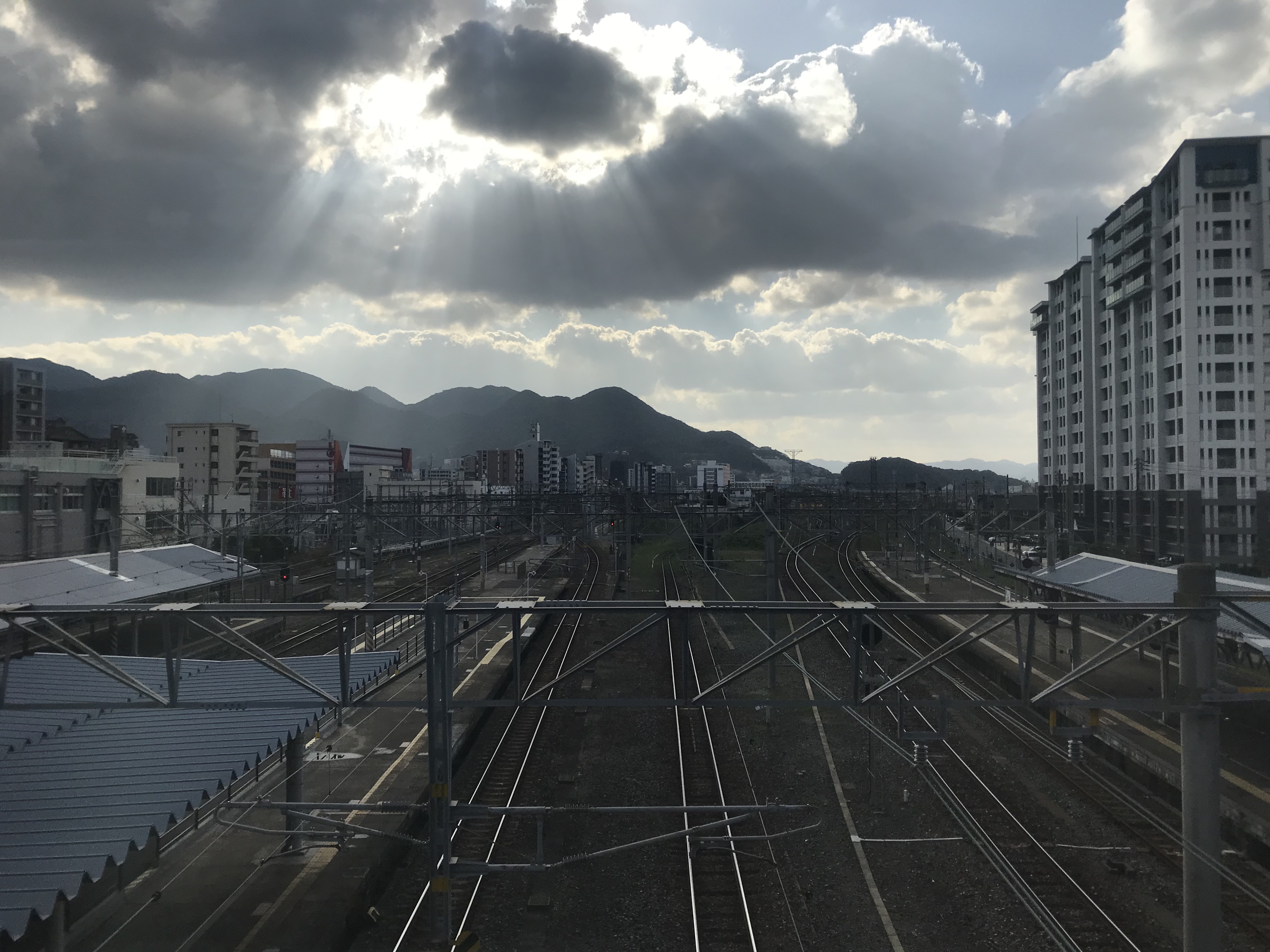 門司駅前の歩道橋より望む小倉方面